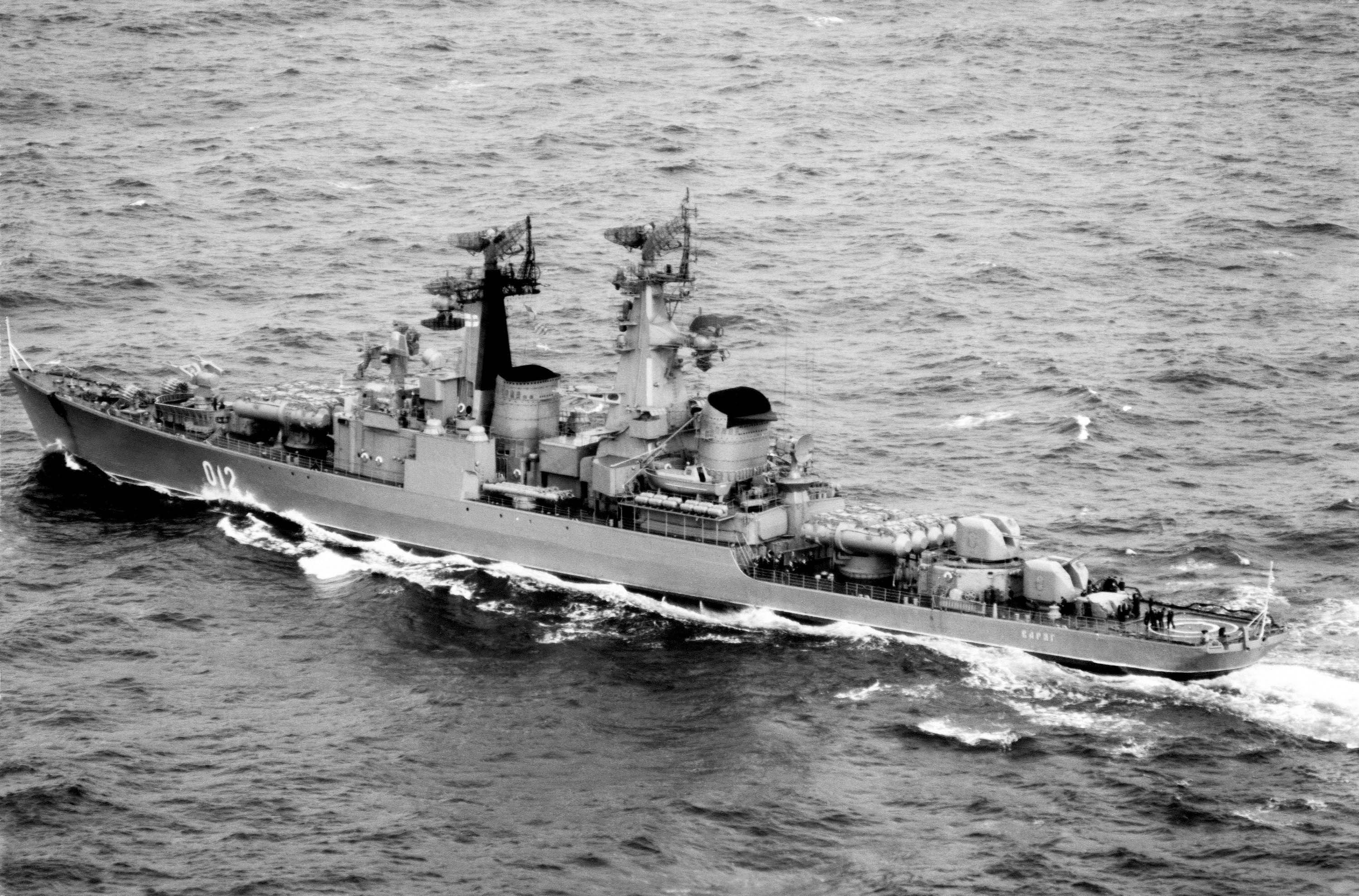 Ракетный крейсер Варяг, 9 сентября 1988 года.